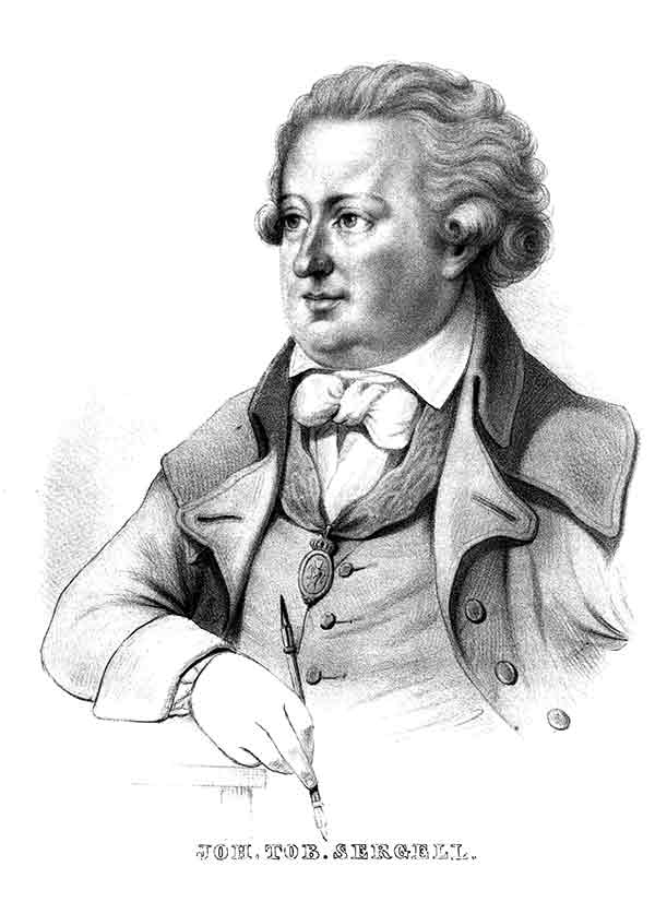 Johan Tobias Sergel (1740-1814)